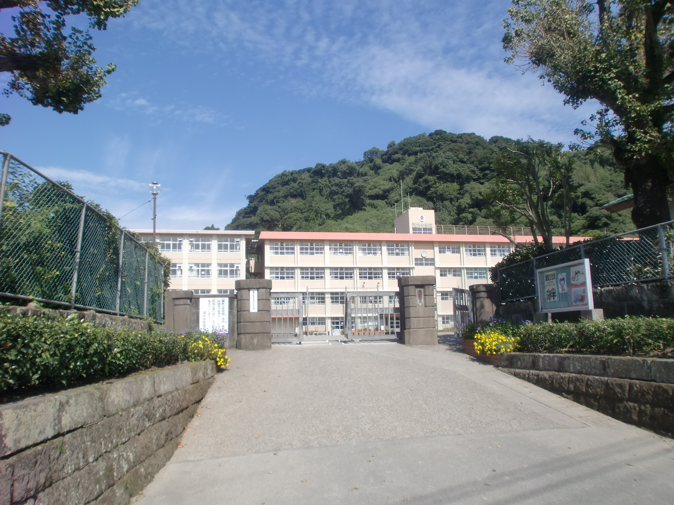 鹿児島市立清水小学校の外観。